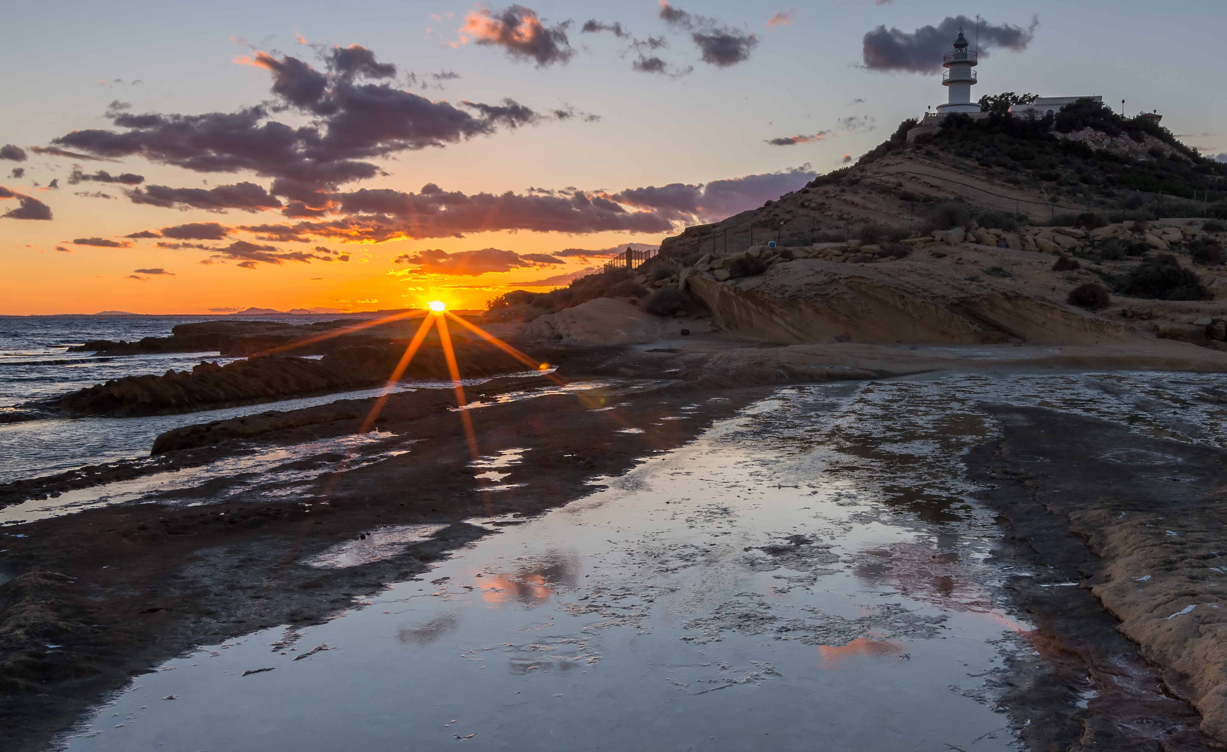 Atardecer en el Faro de la Huerta